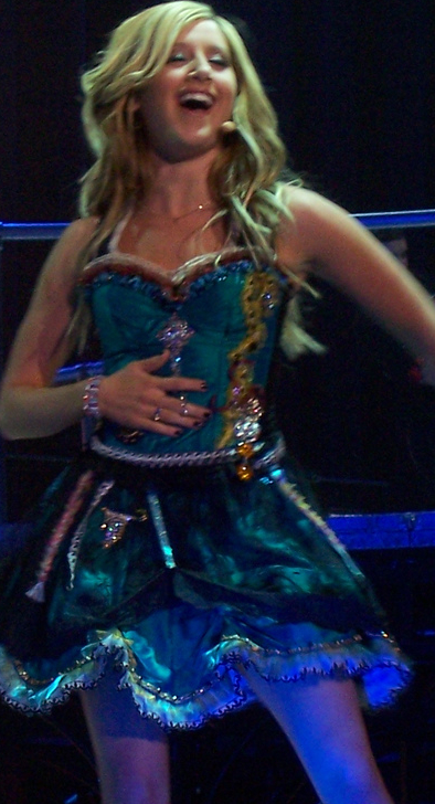 Headstrong